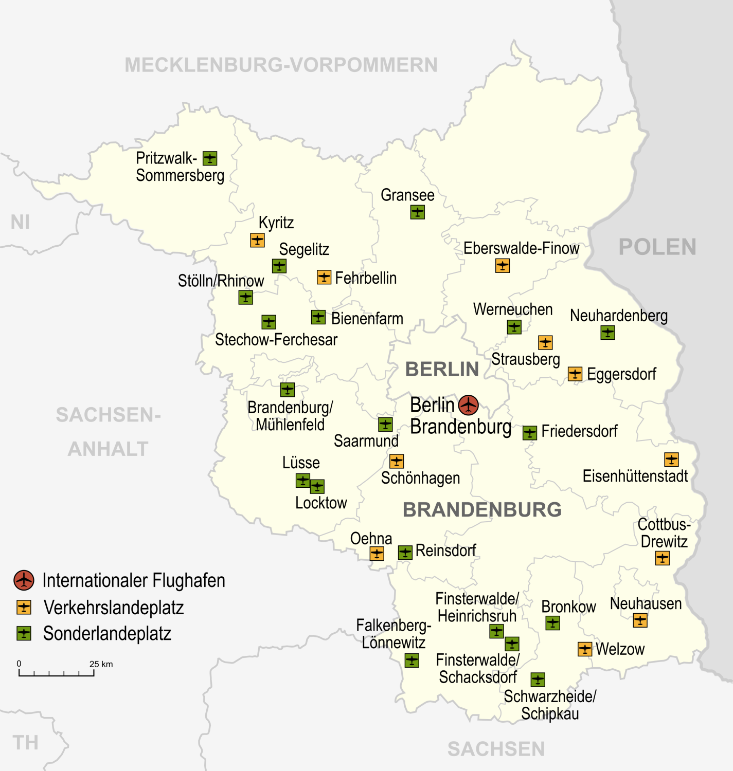 Flughäfen, Verkehrslandeplätze, Sonderlandeplätze und Wasserlandeplätze in Brandenburg, die derzeit als Verkehrs- und Sonderlandeplätze nach der Luftverkehrs-Zulassungs-Ordnung (LuftVZO) in Verbindung mit § 12 Luftverkehrsgesetz (LuftVG) klassifiziert sind und u.a. unter einem ICAO-Code geführt werden.